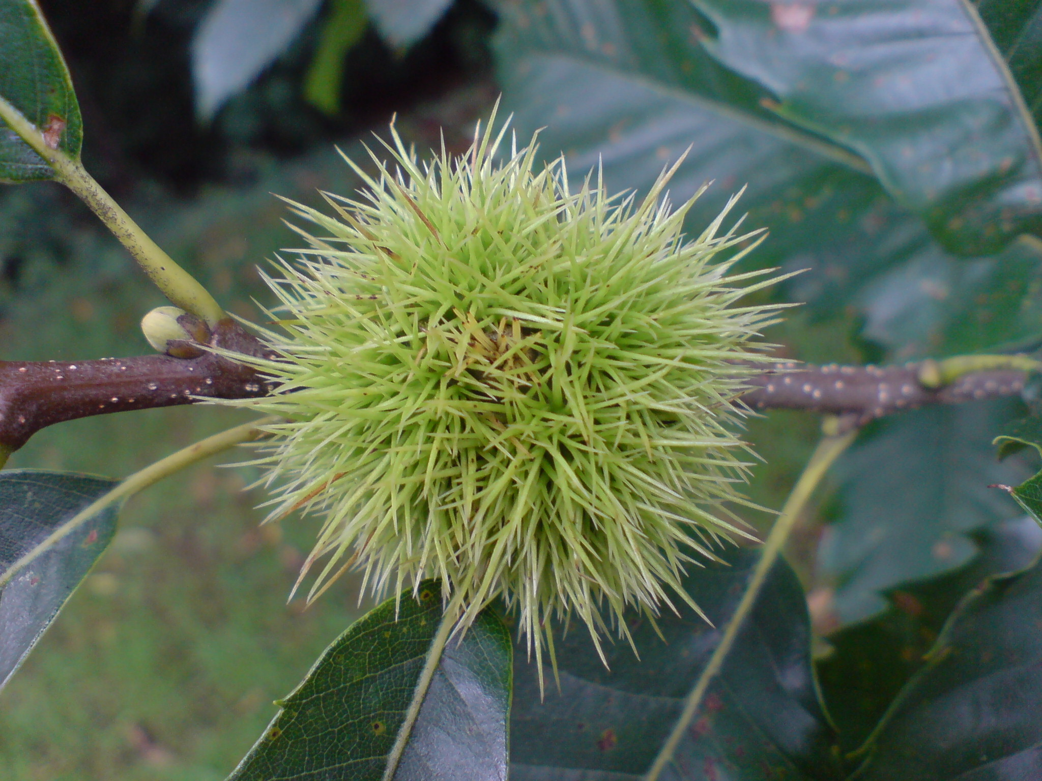 Cette châtaigne prise par mon K800i n'est pas encore mûre, car elle est verte.